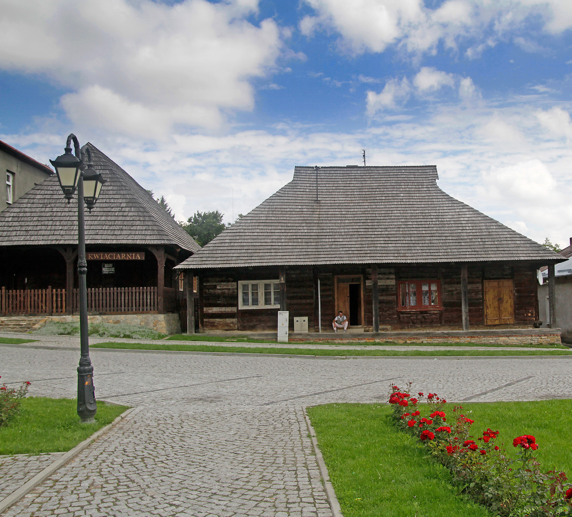 Drewniana zabudowa na rynku w Pruchniku.